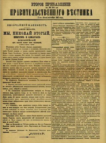 Manifesto del 17 ottobre 1905 pubblicato dal Pravitel'stvennyj vestnik